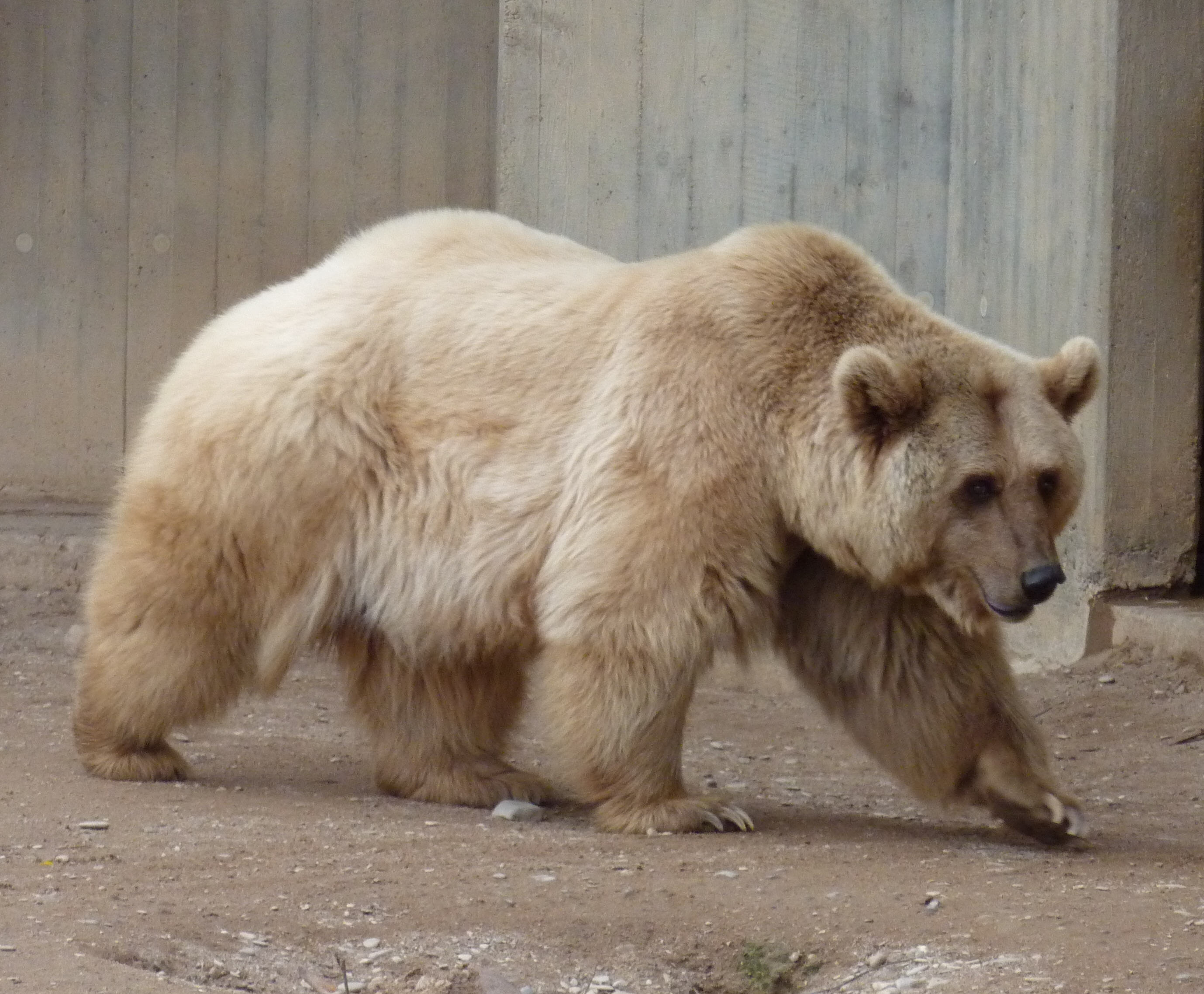 Braunbär im Heidelberger Zoo